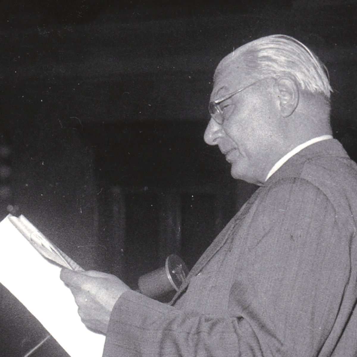 Karel Neuwirth, profesor urologie MU, na jednom z odborných vystoupení